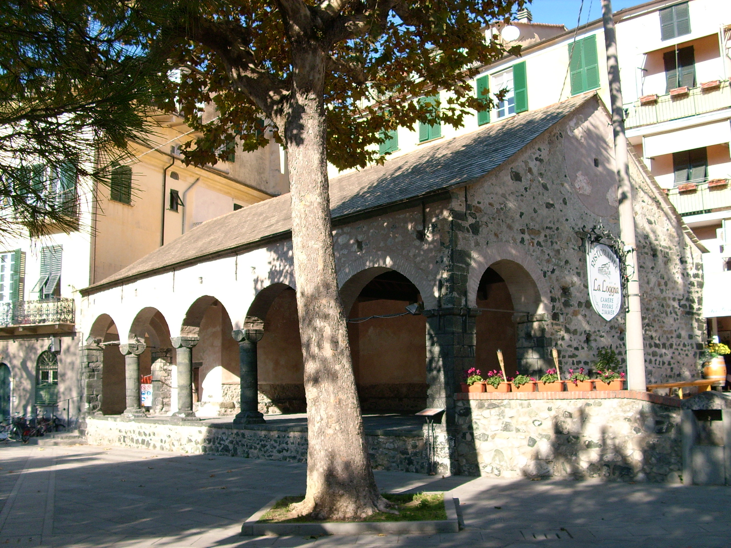 Loggia medievale di Levanto, Liguria, Italia